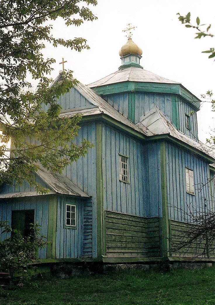 Церква Святого Степана у селі Зубарях. 18 століття.